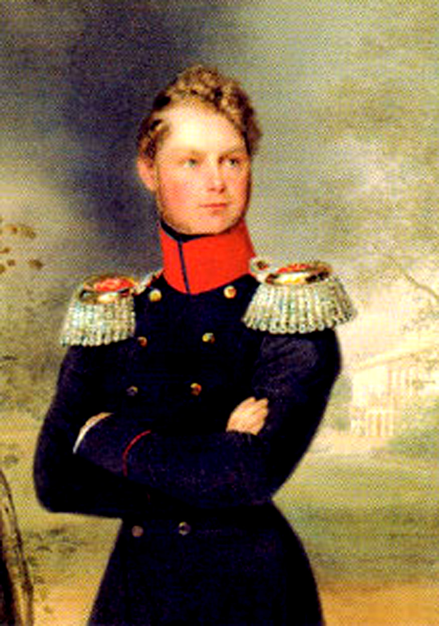 Prinz Carl vor Schloss Glienicke